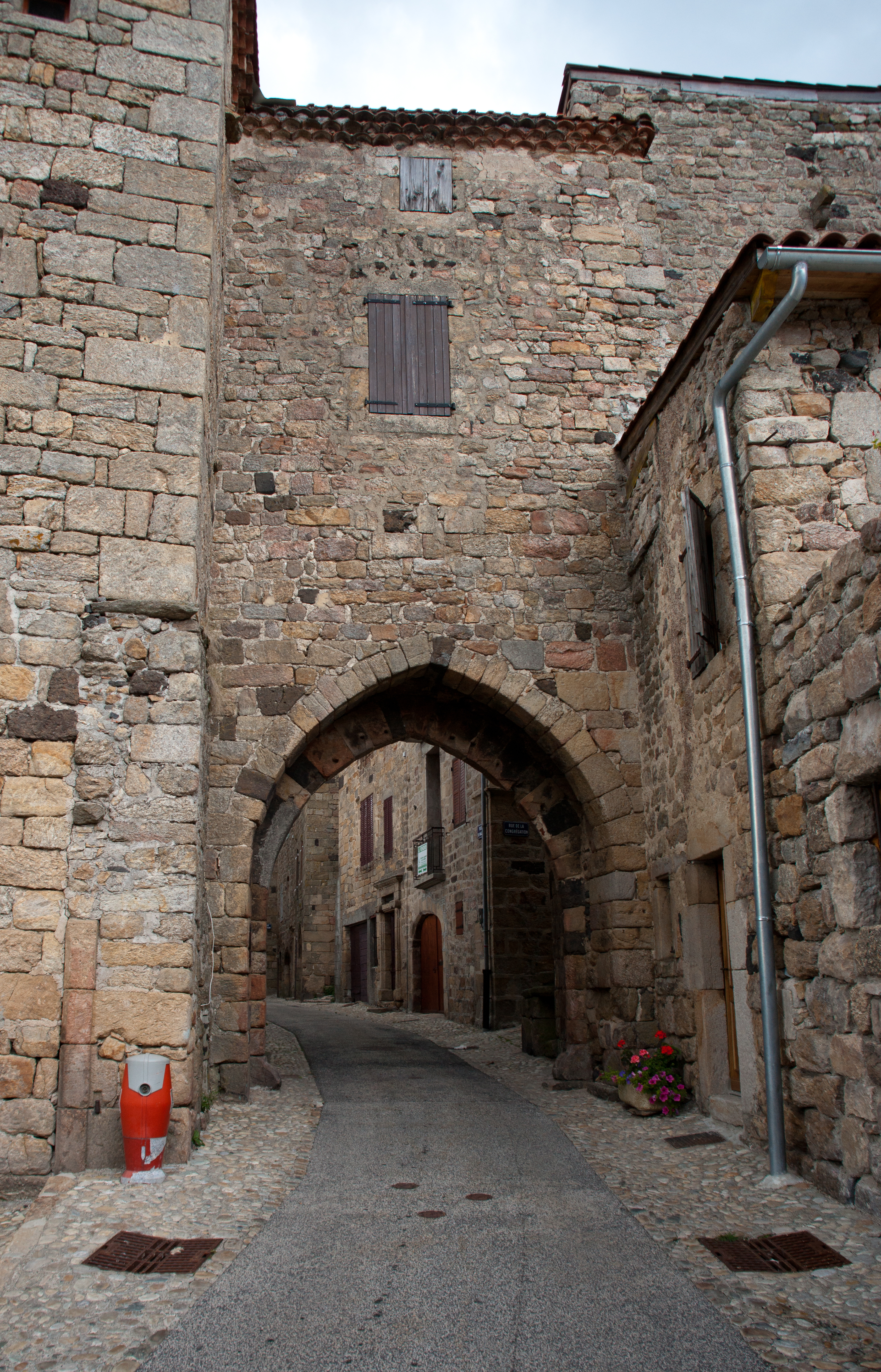 Pradelles - Porte Besset